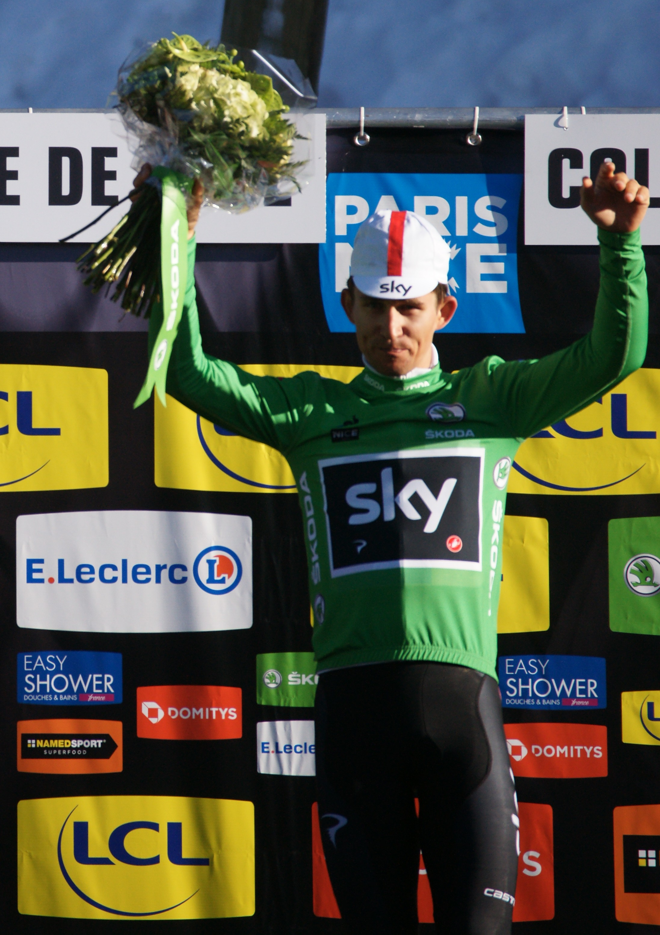 Michał Kwiatkowski, vert, Paris-Nice 2019